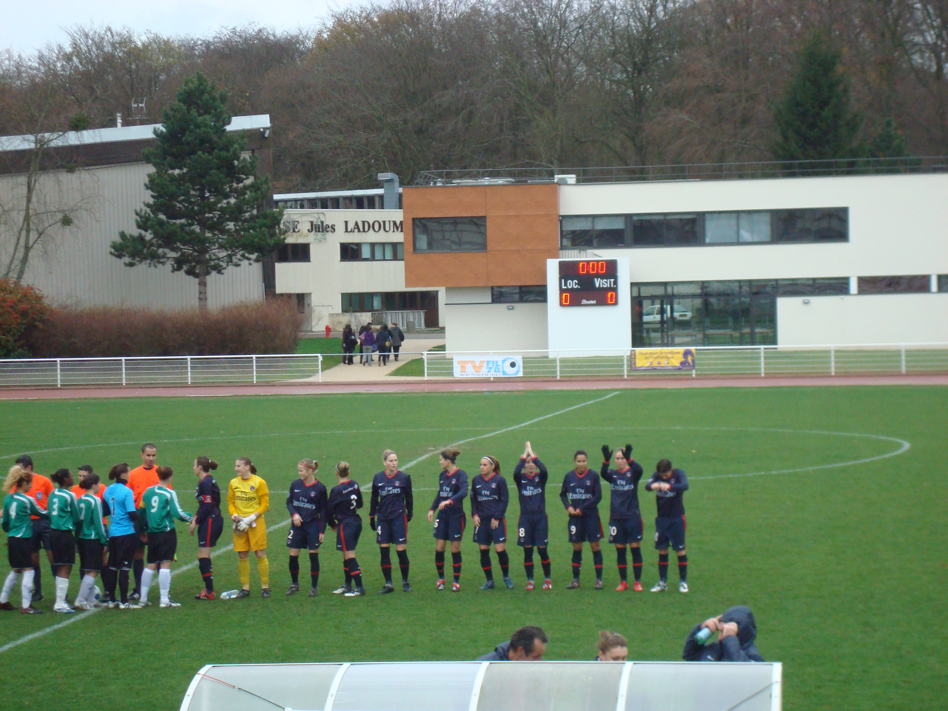 29 novembre 2009, huitième journée du championnat de France de football féminin entre l'AS Montigny-le-Bretonneux et le Paris Saint-Germain.